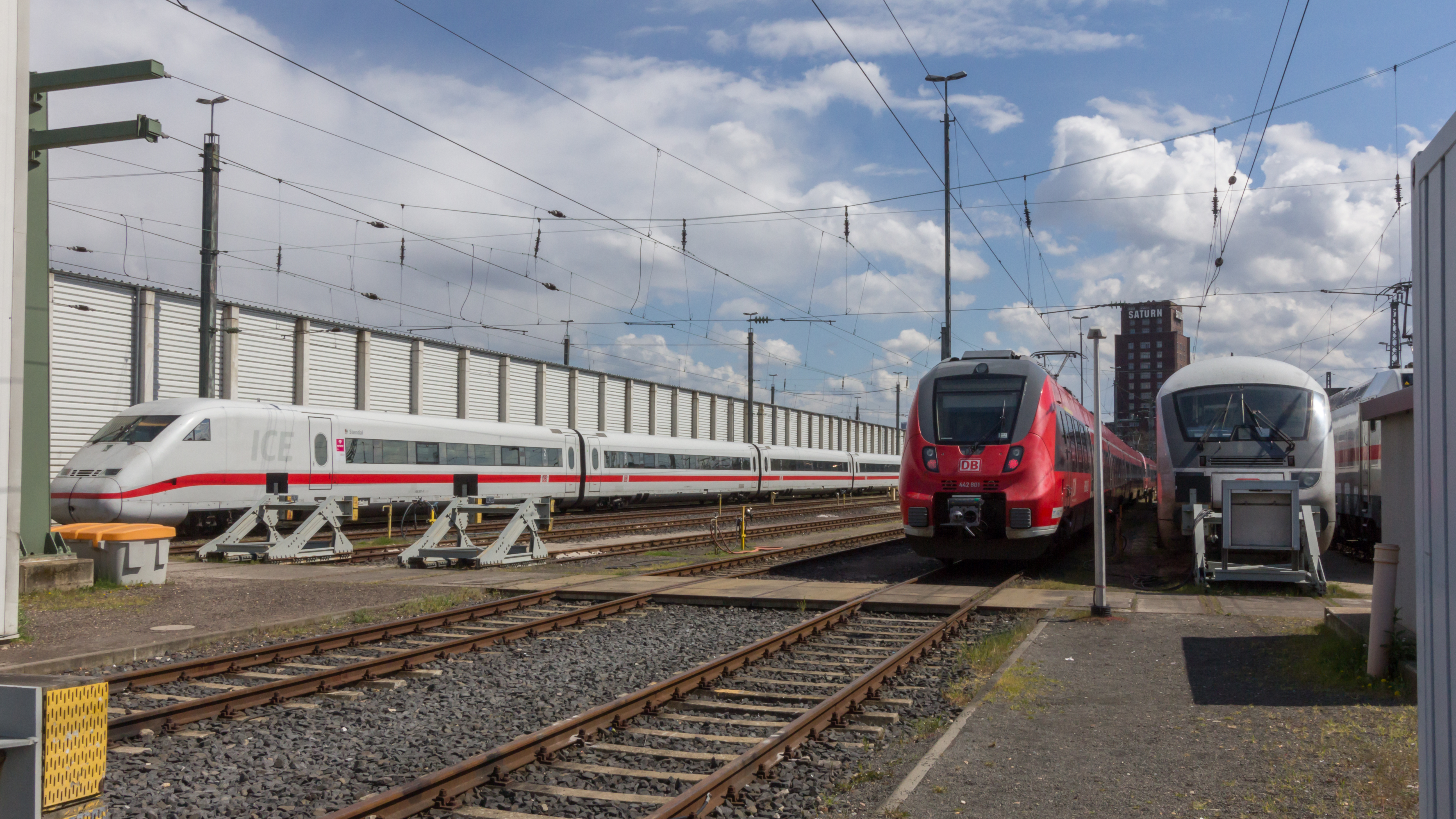 Pressetermin im ICE-Betriebswerk Köln. Foto: Blick auf Züge auf Außengleisen. Links der ICE 2 „Stendal“ (Tz 207), Mitte ein Nahverkehrszug der DB Regio mit Triebwagen 442 801